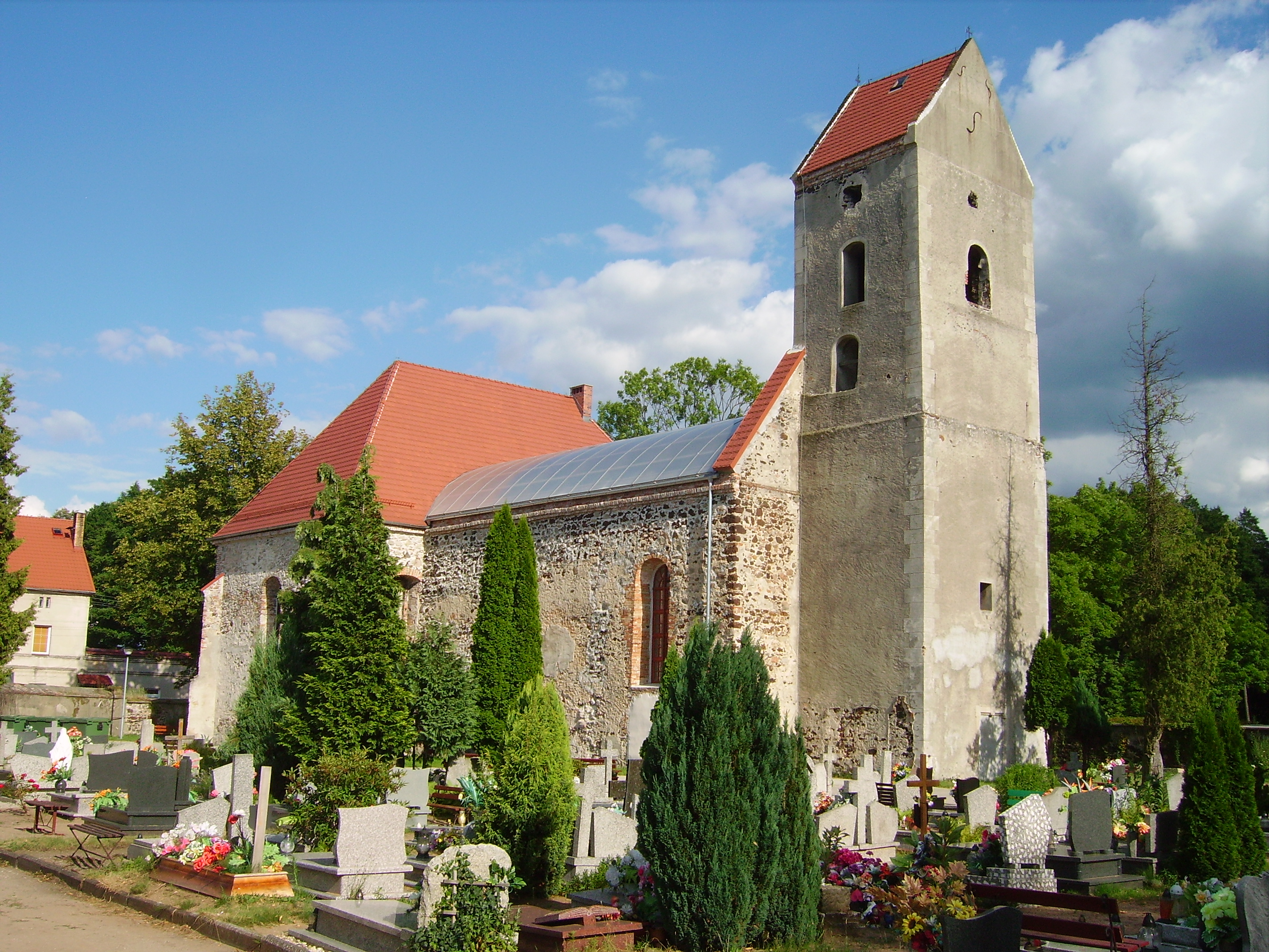 Odremontowane ruiny kościoła ewangelickiego w Ruszowie.